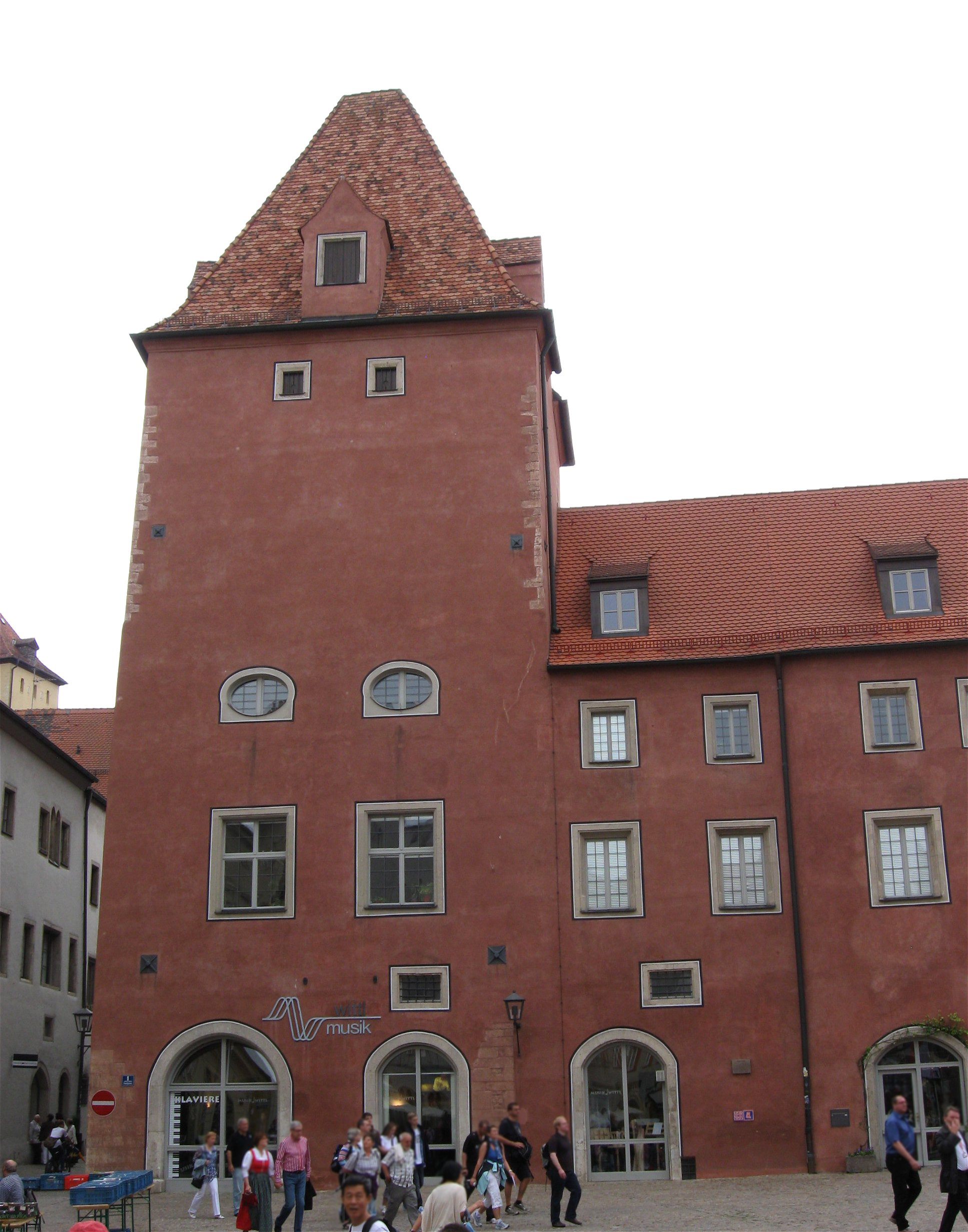 Haidplatz 1. Neue Waag, jetzt Verwaltungsgericht, dreigeschossige Vierflügelanlage mit Walmdach und Turm, Turm und Nordtrakt um 1300, Umbauten um 1440 und 1572-87, Hofarkaden der Renaissance, um 1573, Teilneubauten nach Kriegszerstörungen 1944/45; seit 1441 Stadtwaage, später Ratsherrentrinkstube, 1782 Einrichtung der Reichsstädtischen Bibliothek.